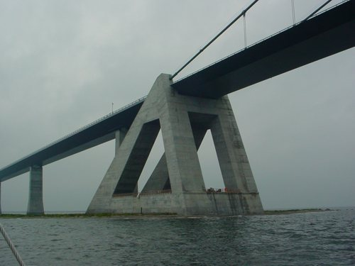 Brücke über den Großen Belt - Seilpylon; Blick vom Wasser aus Richtung Nordwesten